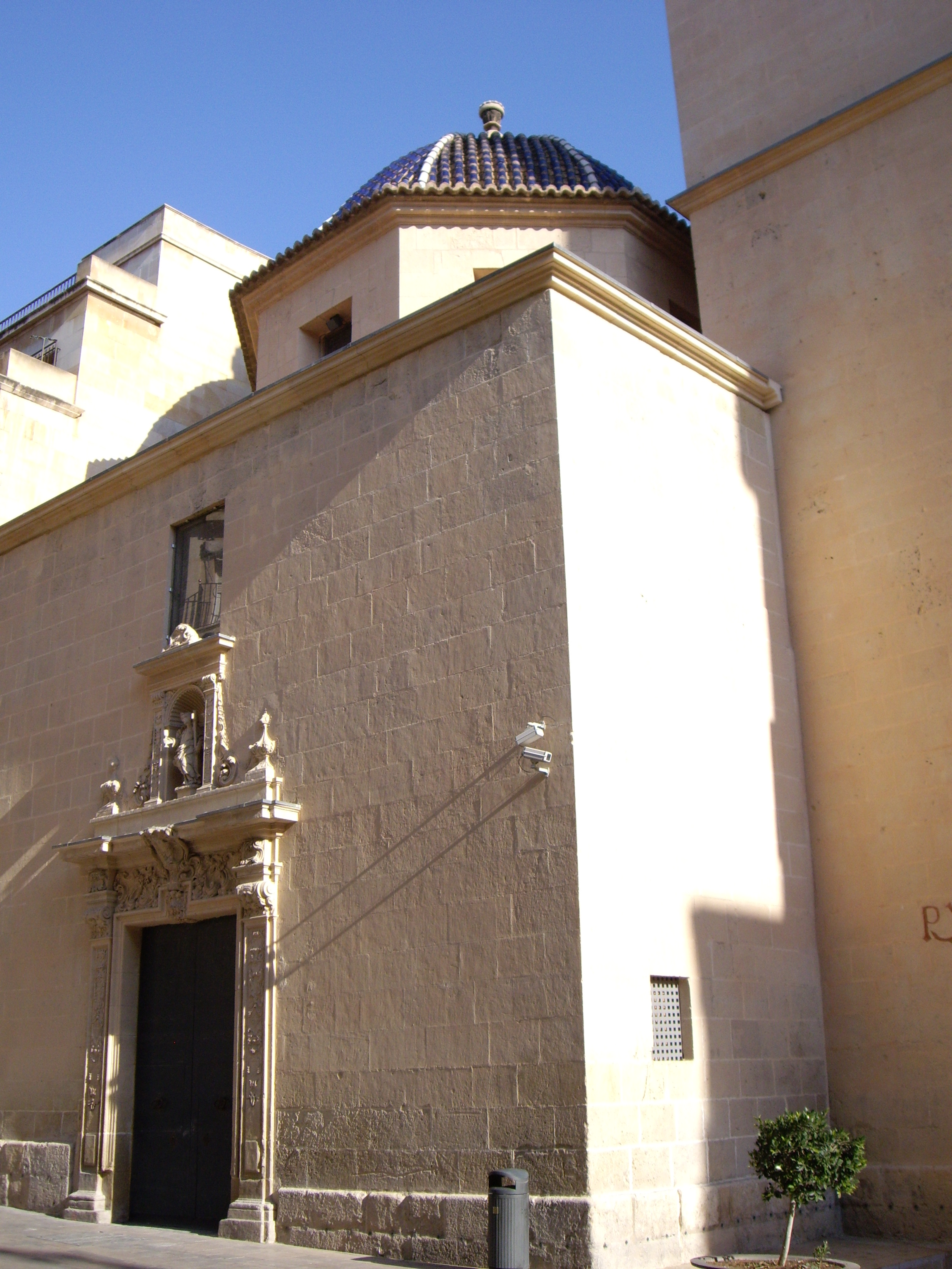 St. Nicolau